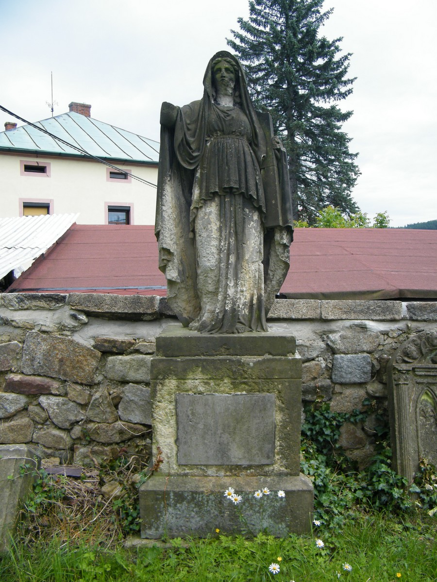 Náhrobek u kostela svatého Bartoloměje ve Velkém Šenově (dílo Franze Pettricha)